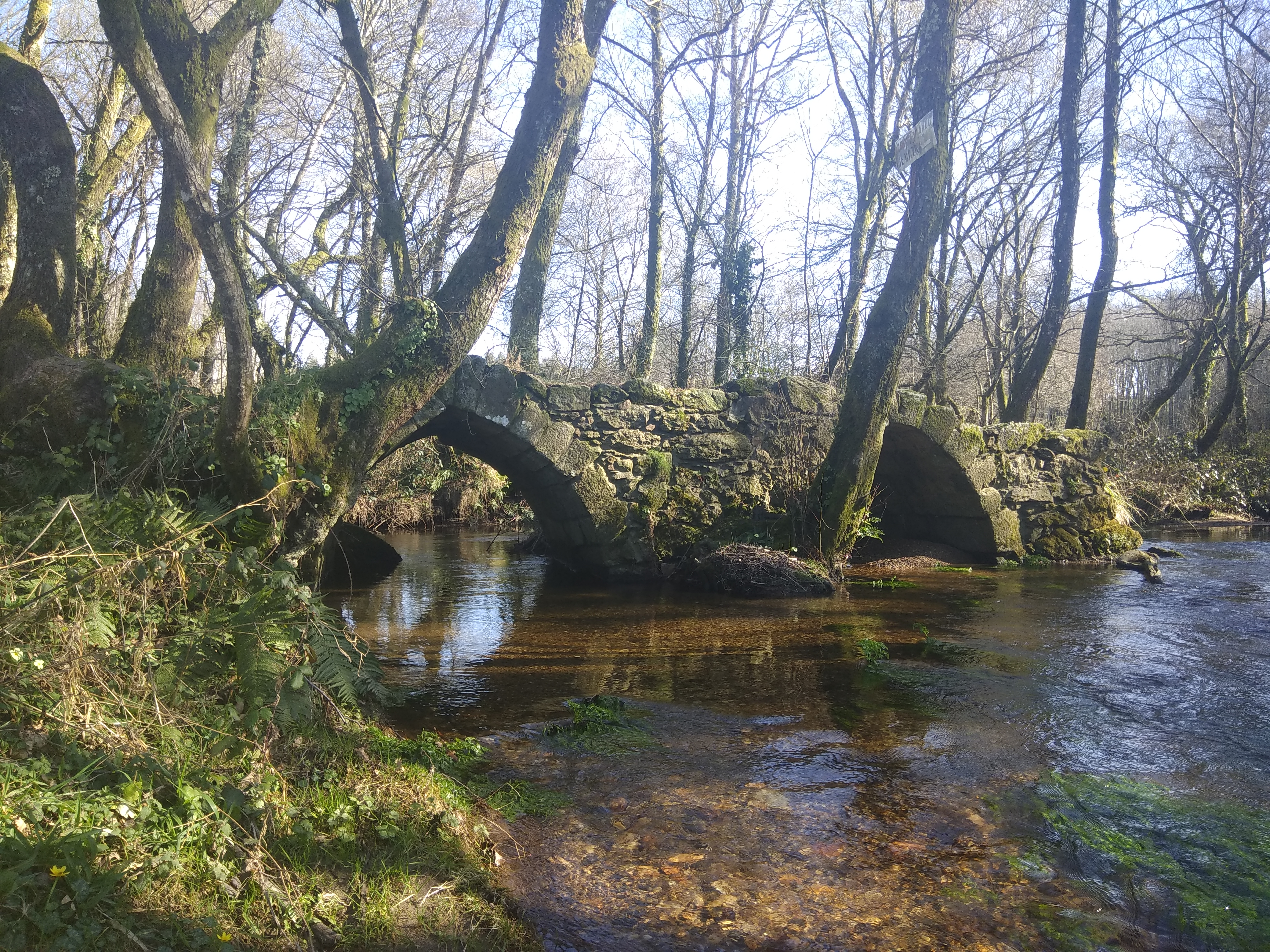 Ponte gótica de Guisó ou ponte de Cepo-Guisó (Cumbraos, Sobrado, Galiza).